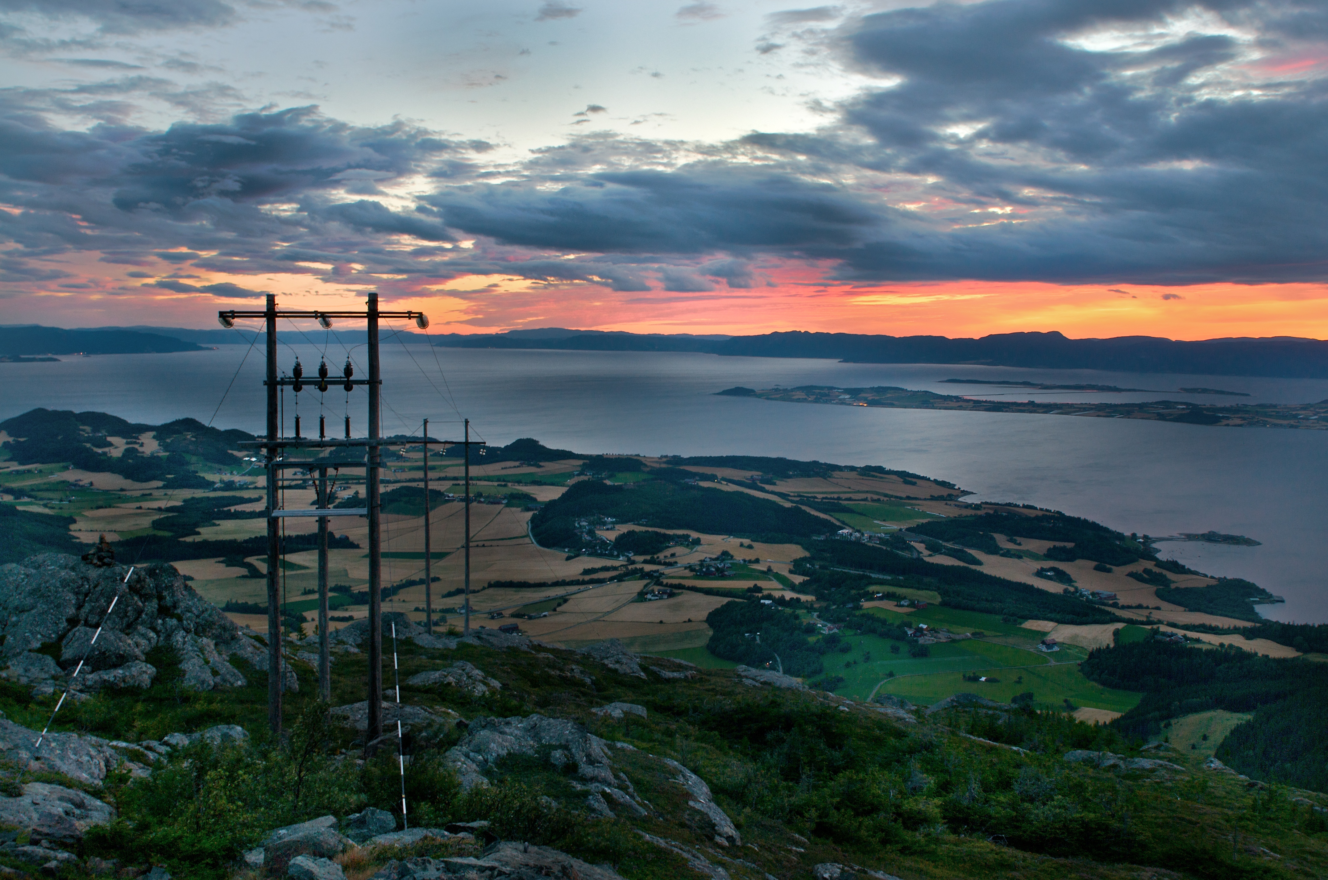 Partier av Skatval (forgrunnen), Frosta (med Tautra), Fosen og Trondheims omland (øverst til venstre). Alt beliggende omkring Trondheimsfjorden. Sett fra Forbordsfjellet på Skatval.